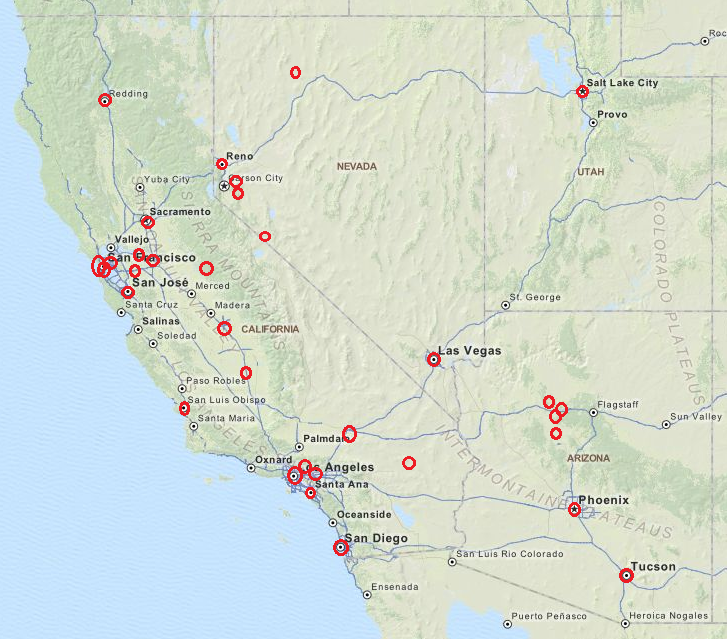 geografische kaart via [1] elke rode cirkel geeft een Chinatown aan in de vier Amerikaanse staten Californie, Nevada, Utah en Arizona